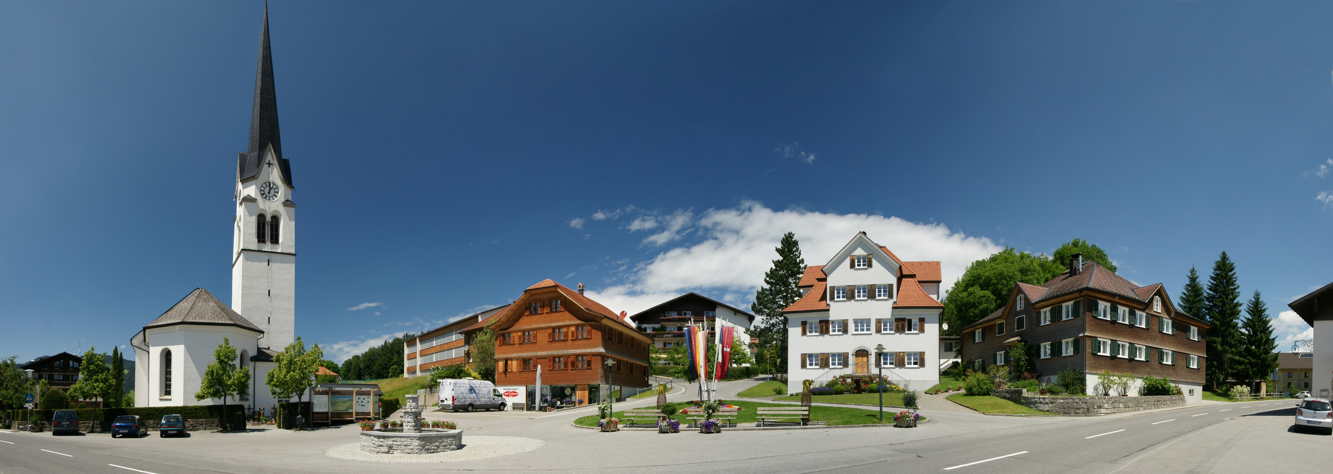 Panoramabild im Zentrum von Lingenau im Bregenzerwald.